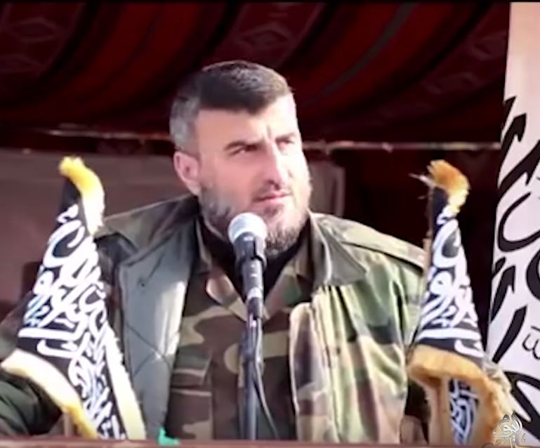 Zahran Allouche, chef du groupe rebelle syrien Jaych al-Islam, le 29 avril 2015.